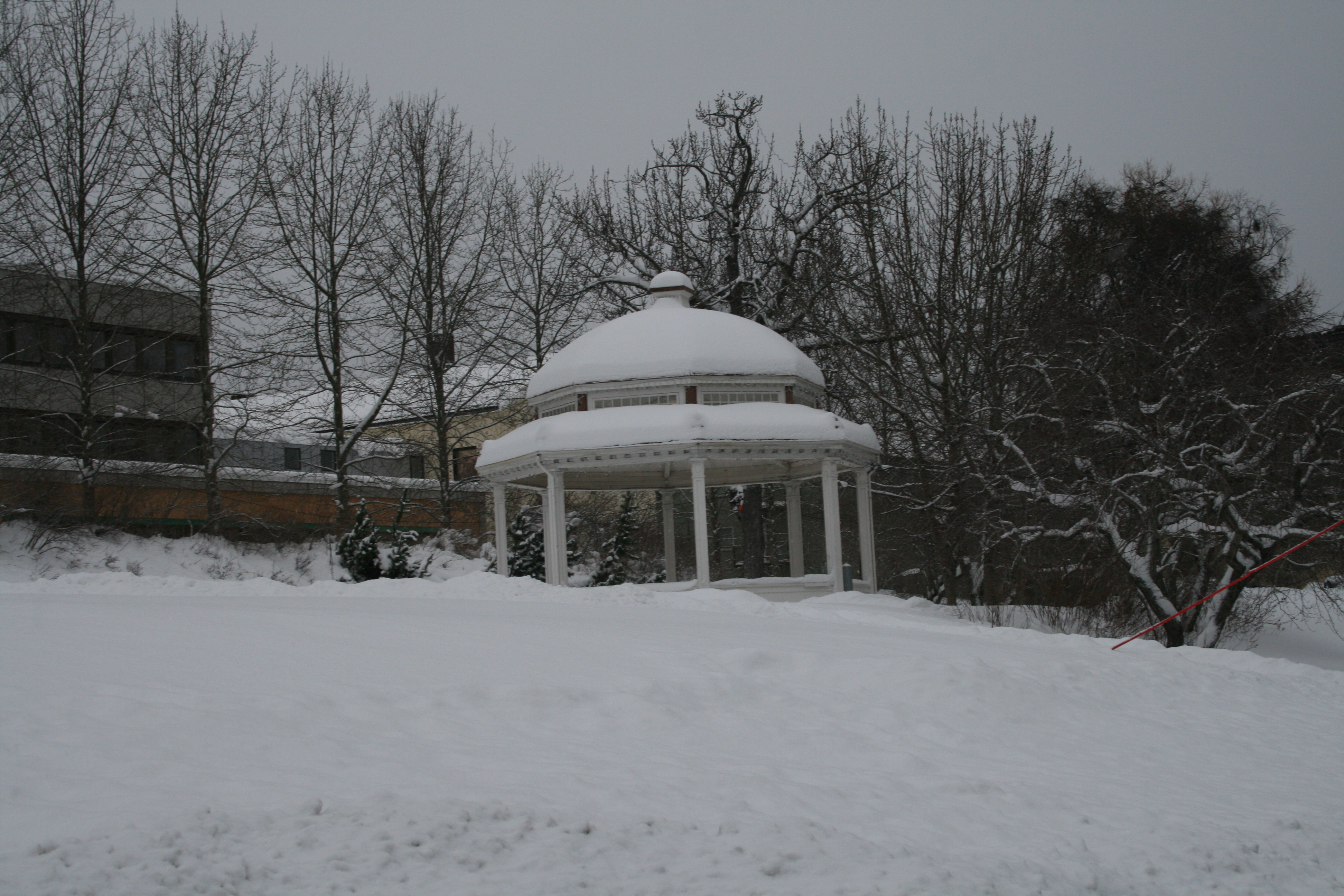 Generalhagen in Harstad, Norway